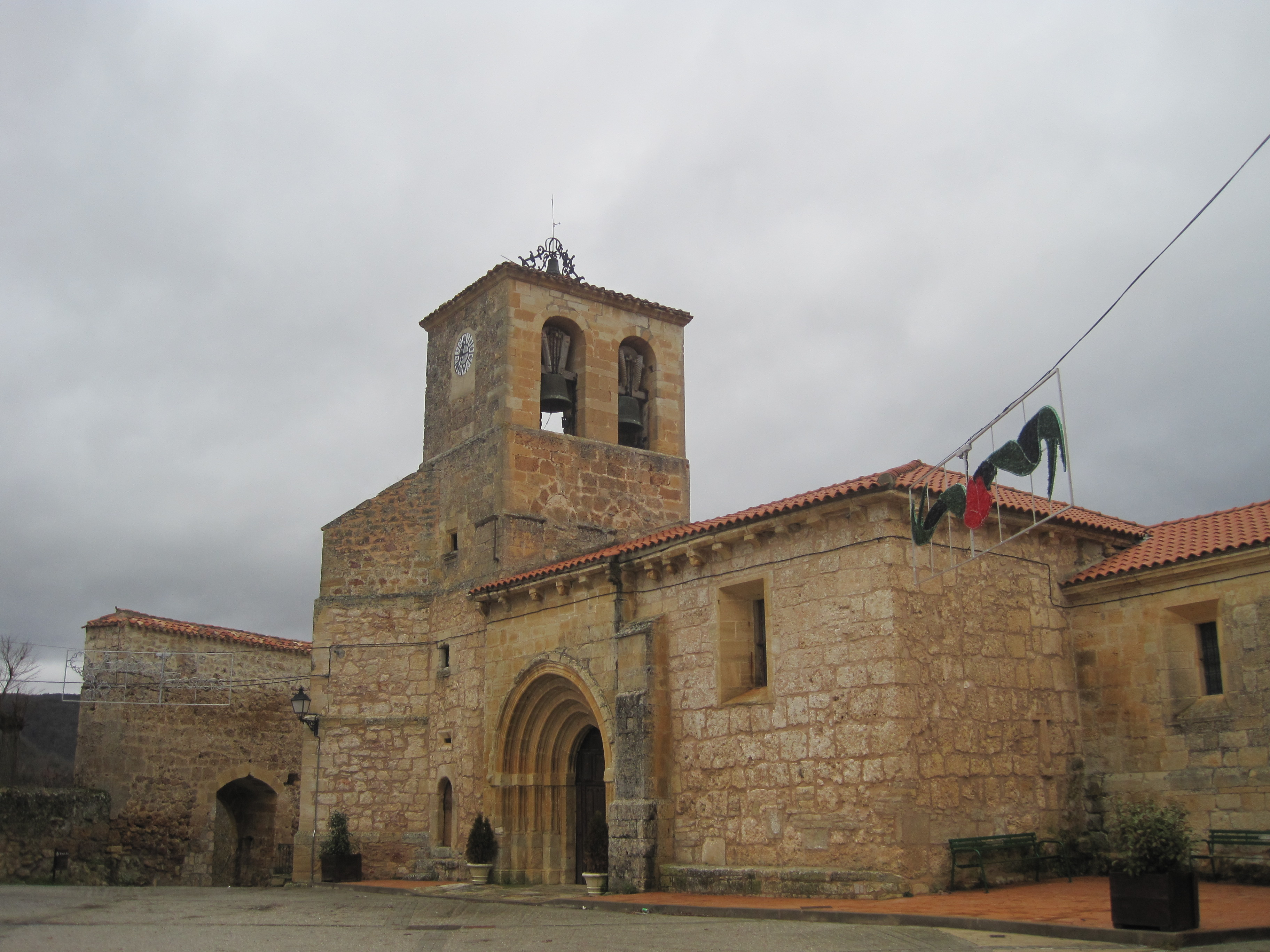 Iglesia de Santa María, vista desde la Plaza de Tubilla.